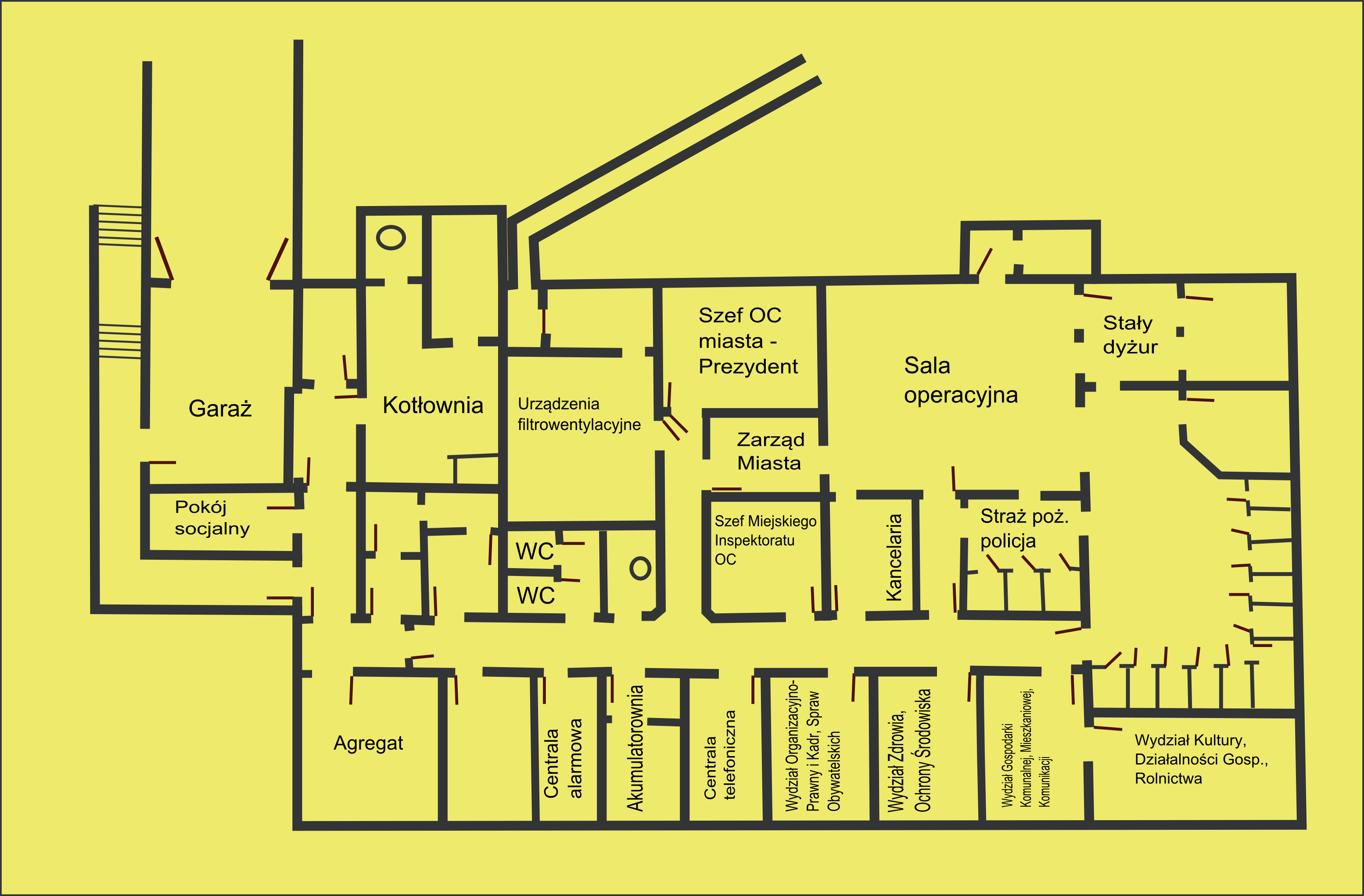 Schron prezydenta Poznania - plan